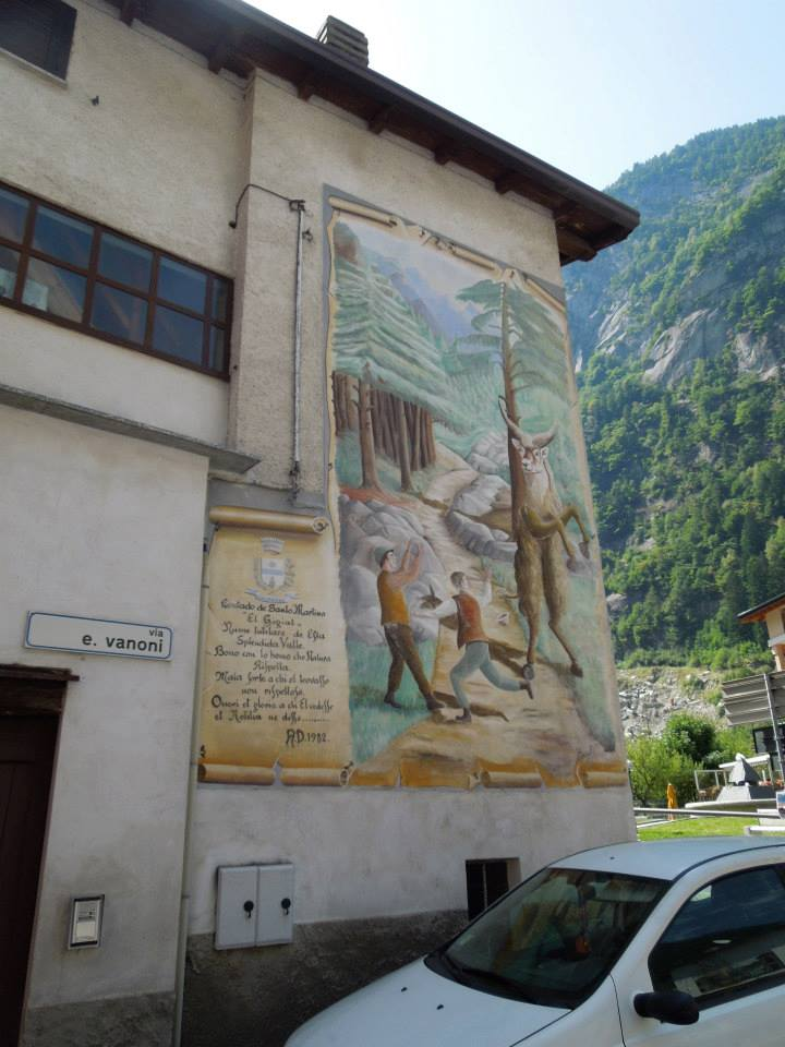 Lumbaart: Pitura del Gigiatt a San Martin, in del comun de la Val Masen (